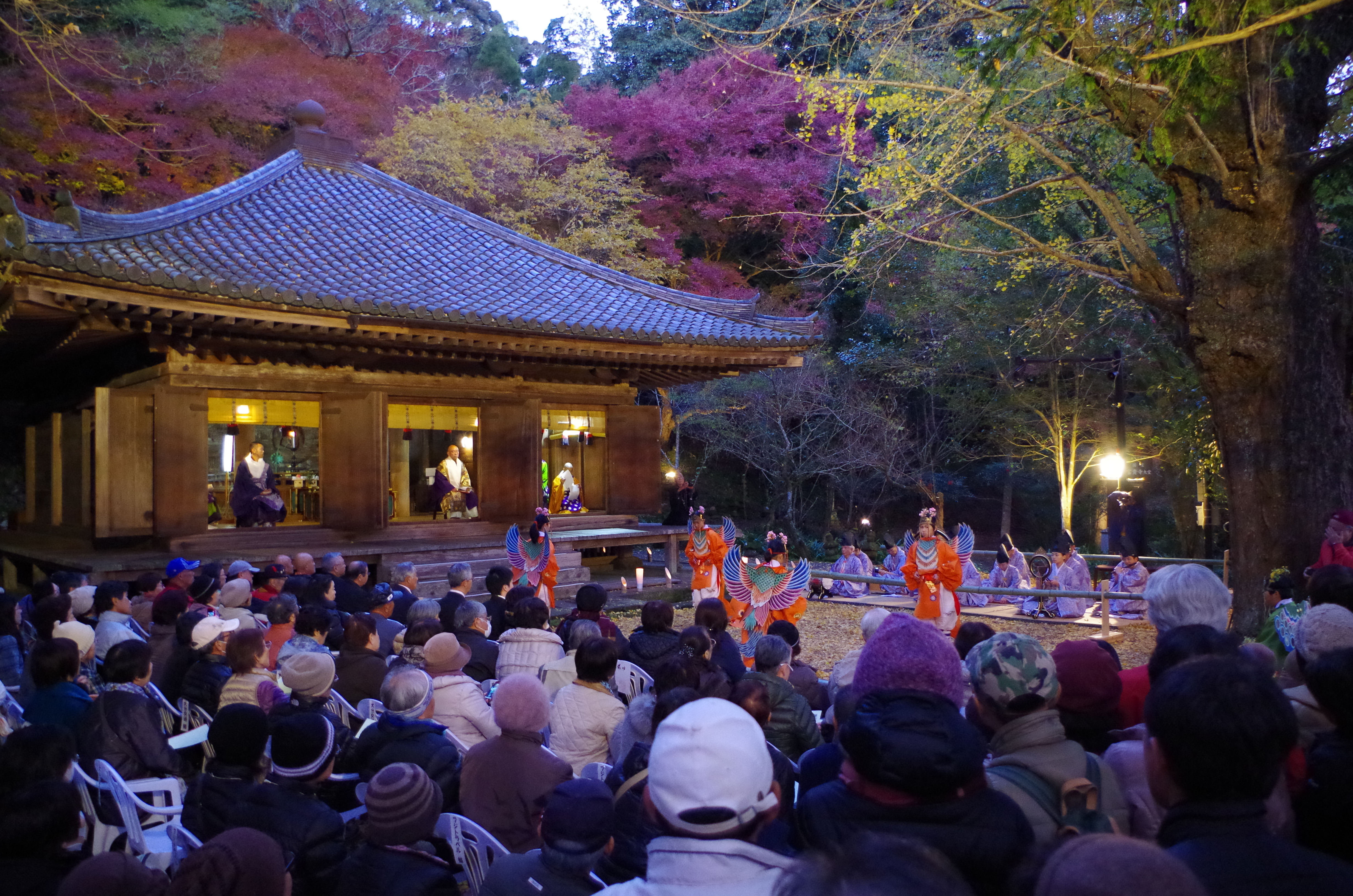 富貴寺大堂の壁画にも描かれた迦陵頻の舞楽